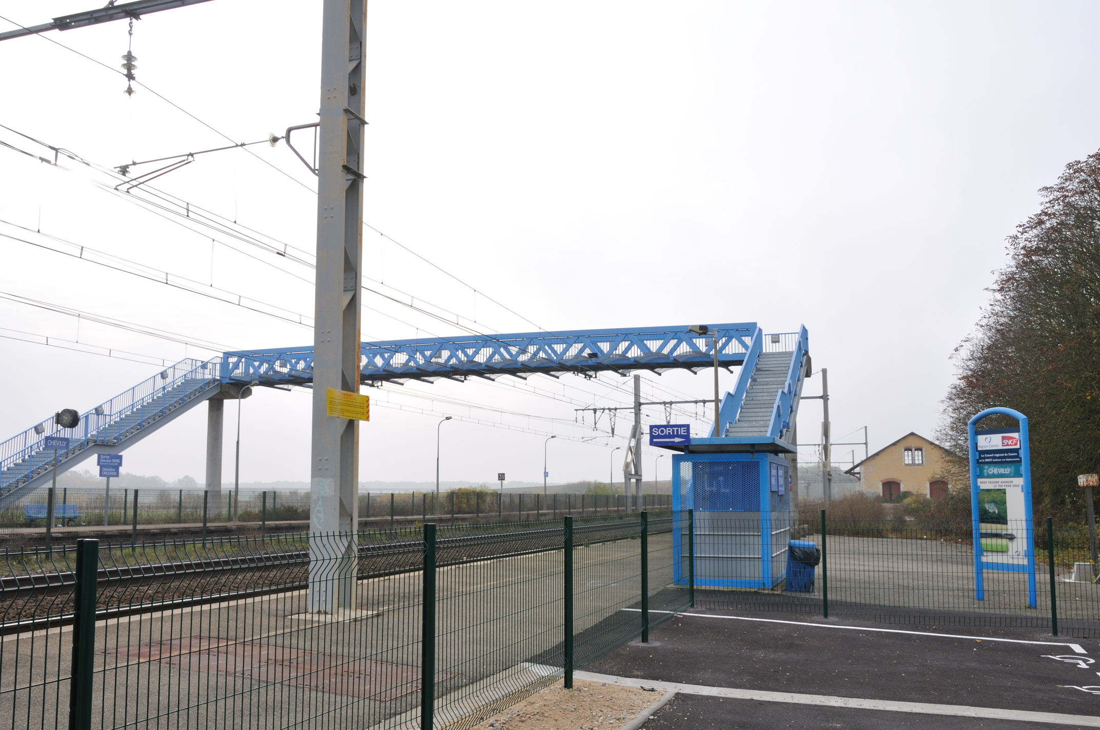 Gare de Chevilly, Loiret, France